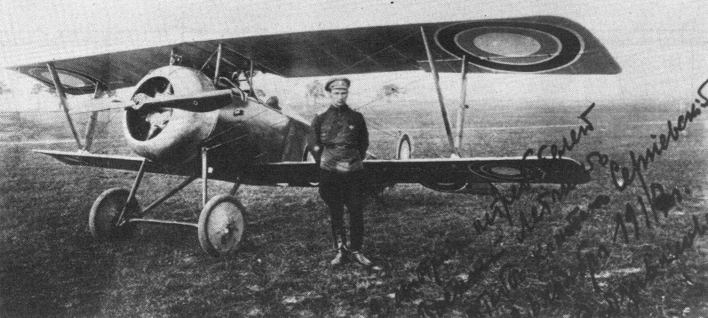 Русский ас Сергиевский Борис Васильевич (1888-1971) и самолет Ньюпор-17. 1917г.